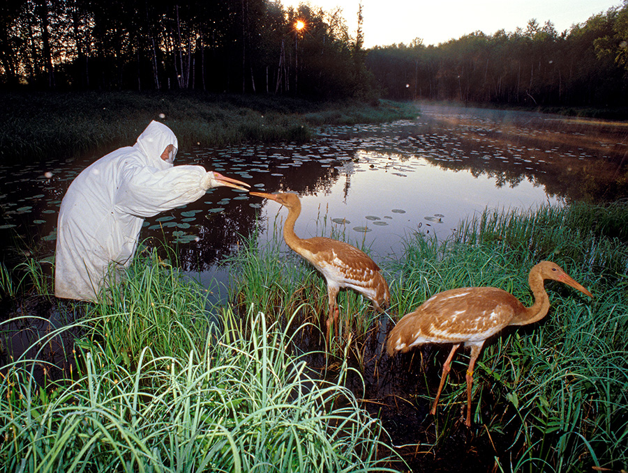 В журавлином питомнике Окского заповедника.